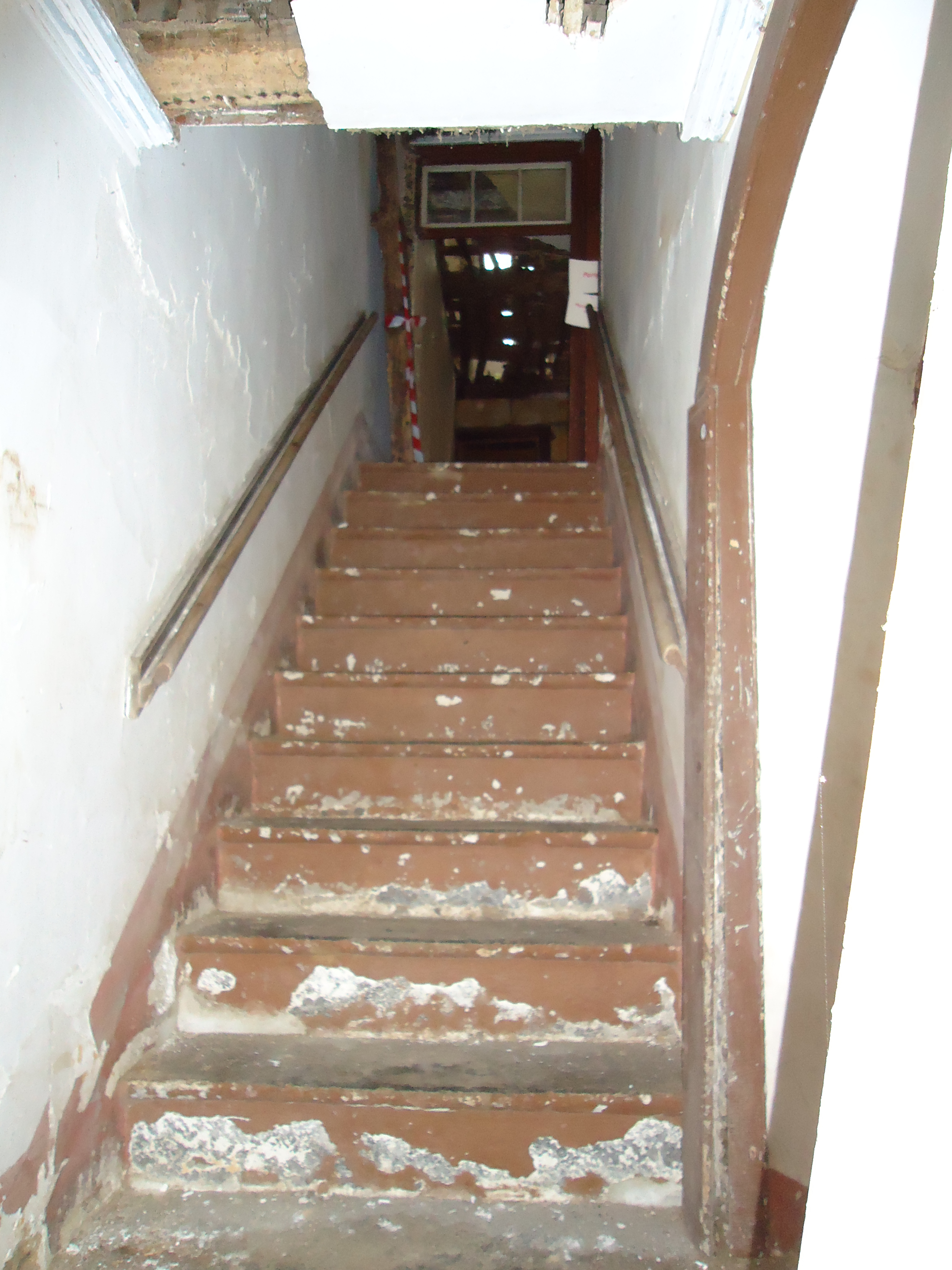 Sinagoga Shaar Hashamain, cidade e concelho de Ponta Delgada, ilha de São Miguel, Açores: aspecto do interior.